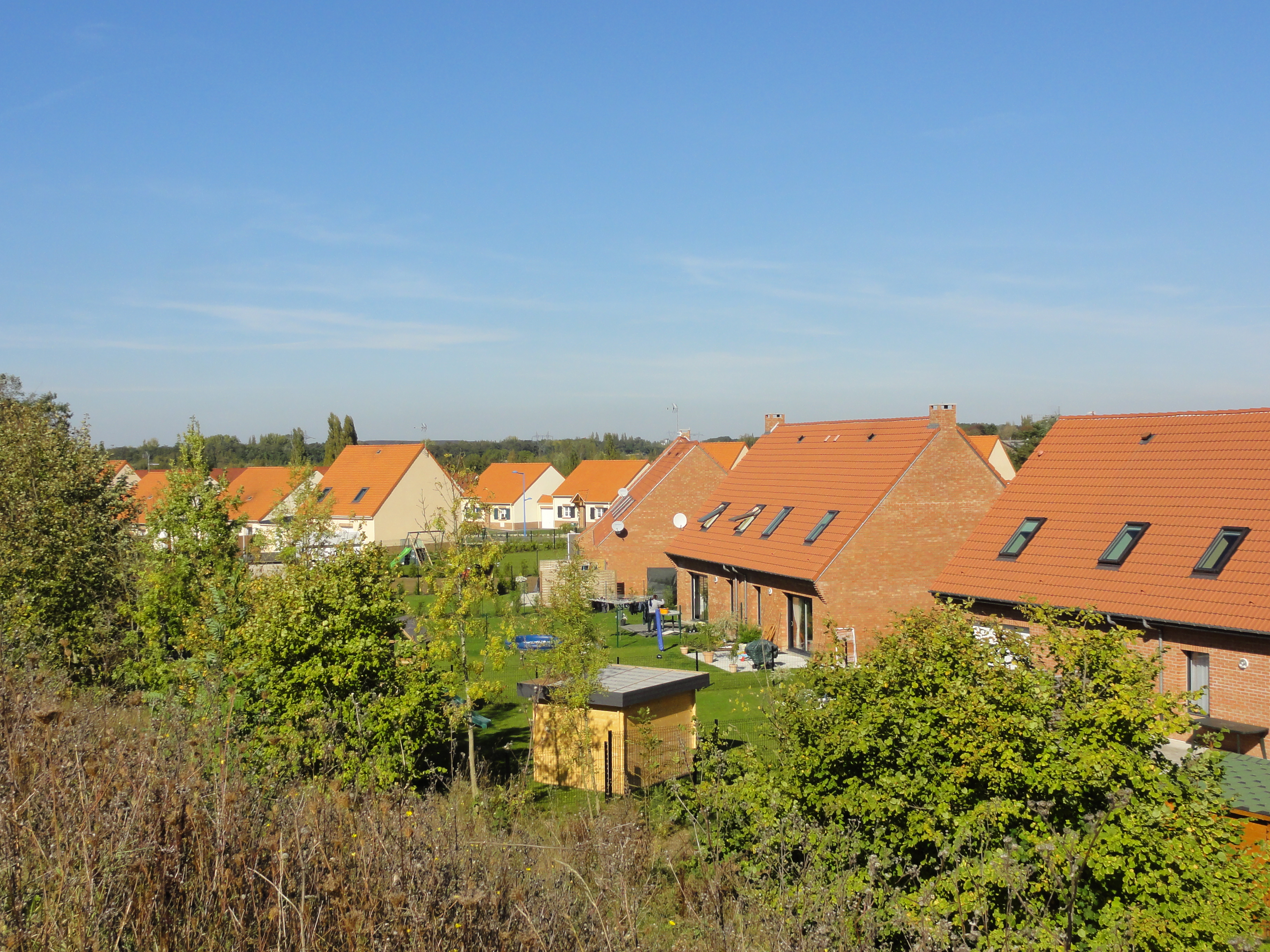 Terril n° 104A dit 10 Sud de Courrières nord, disparu, fosse n° 10 - 20 de la Compagnie des mines de Courrières dans le bassin minier du Nord-Pas-de-Calais, Billy-Montigny, Pas-de-Calais, Nord-Pas-de-Calais, France.